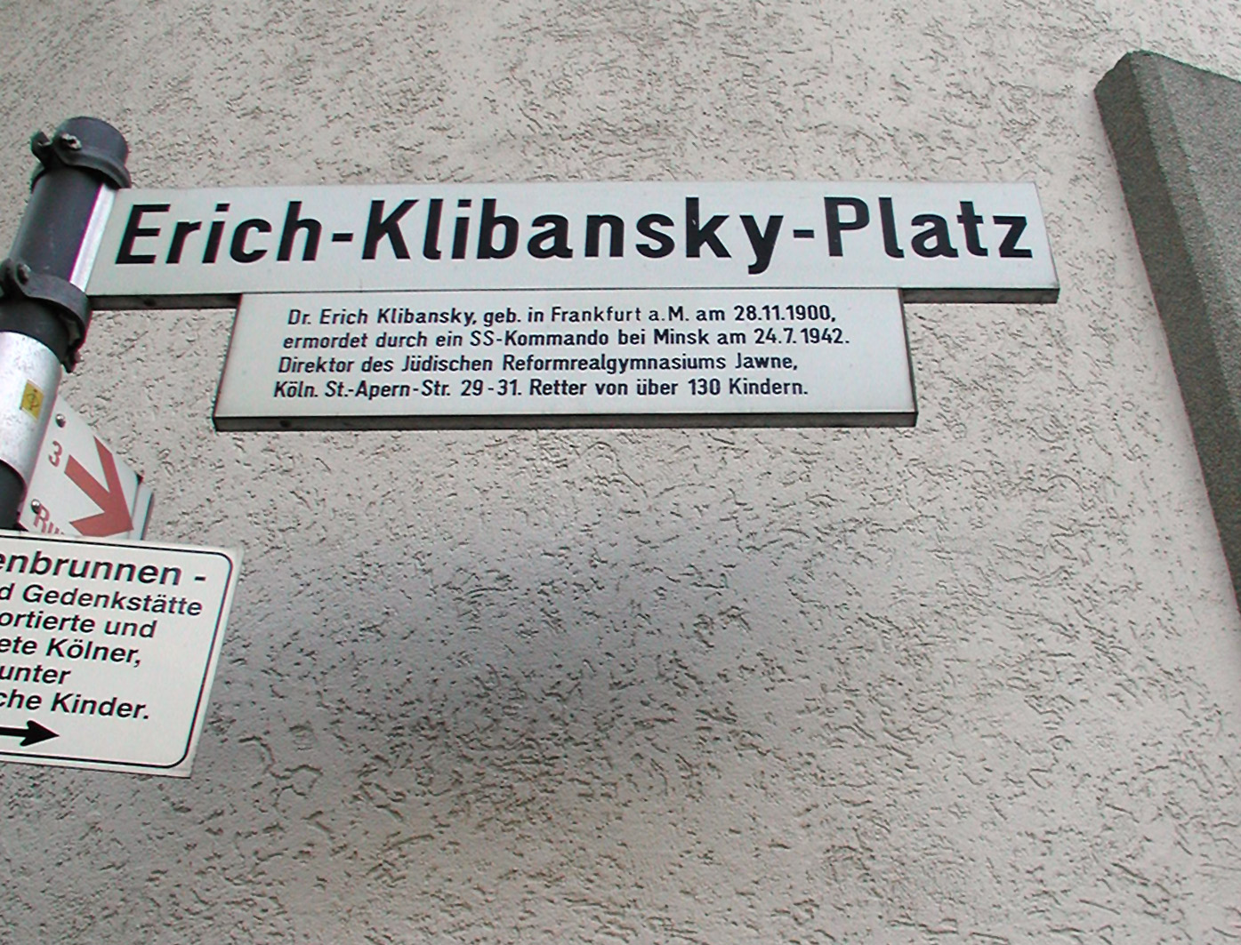 Köln, Erich Klibansky Platz